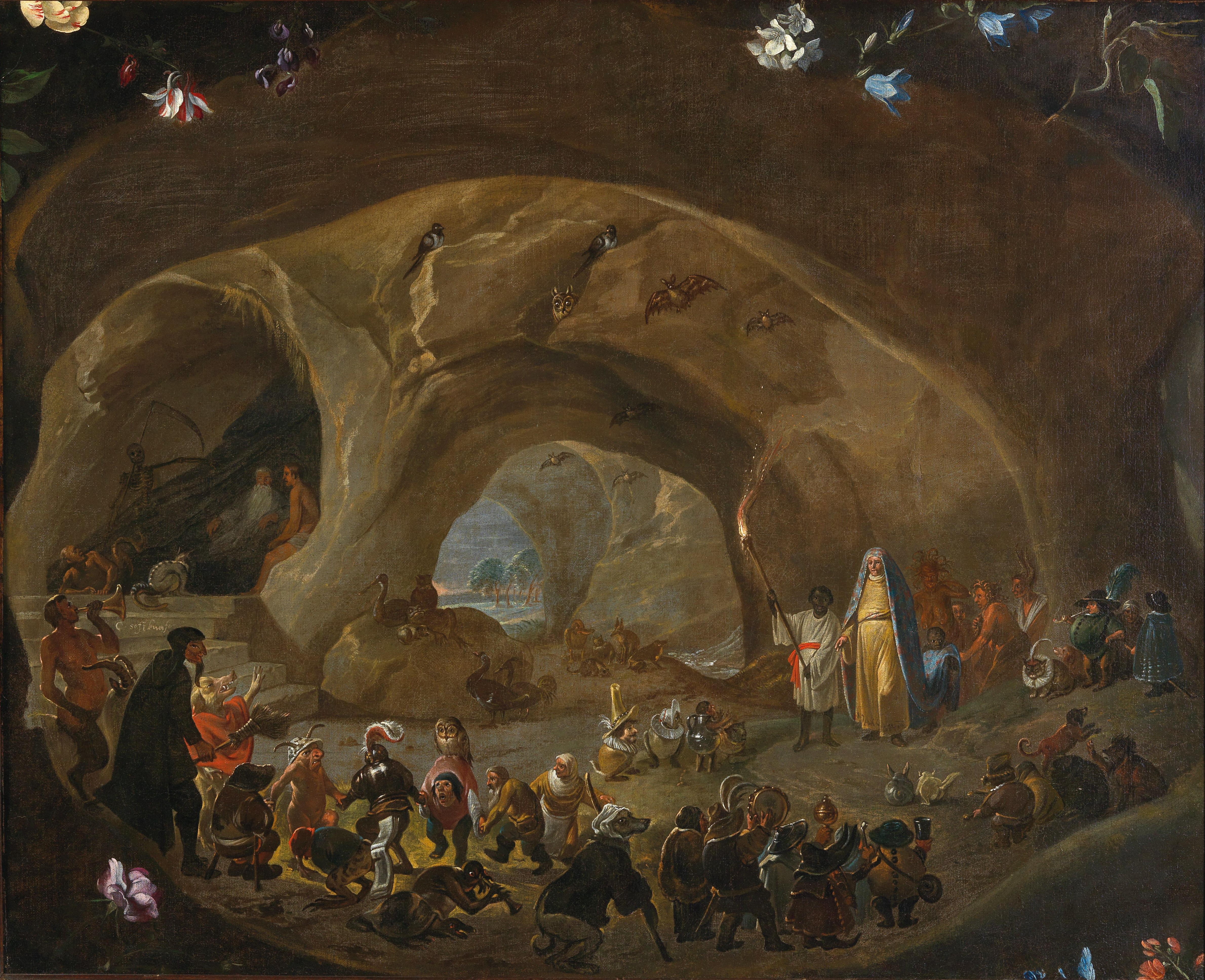 Die Versuchung des heiligen Antonius, signiert unten links (auf der Treppenstufe): C. Saftleven f., Öl auf Leinwand, 84 x 102 cm Provenienz: Auktion Baron Ribeyre & Associès, Paris, 9. April 2010, Lot 51a Die Blüten am oberen und unteren Bildrand sind ein Hinweis auf eine ehemals umgebende Blumengirlande.